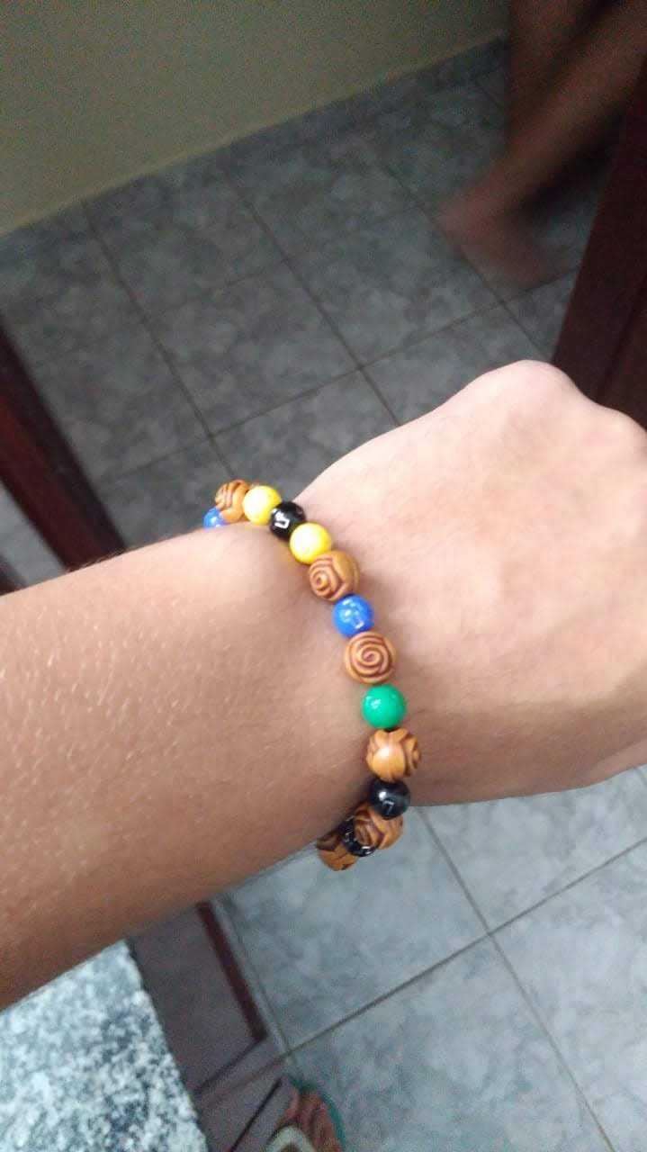 Un denario.